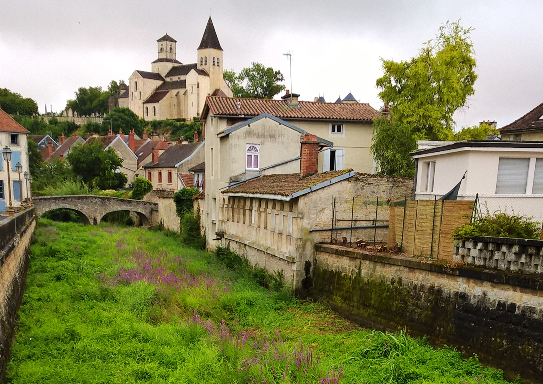 La Seine totalement tarie en amont de la Douix de Châtillon-sur-Seine